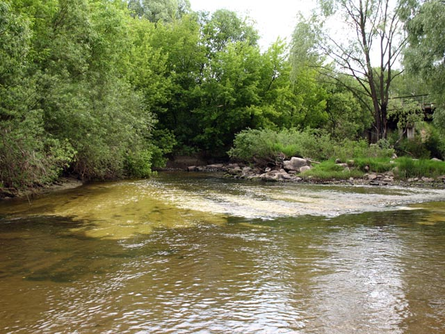 річка Ірша, поблизу Малина